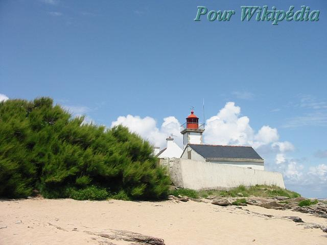 Photo de l'île de Groix, avec tatouage. Photo personnelle Serged 28 sep 2004 à 09:33 (CEST).